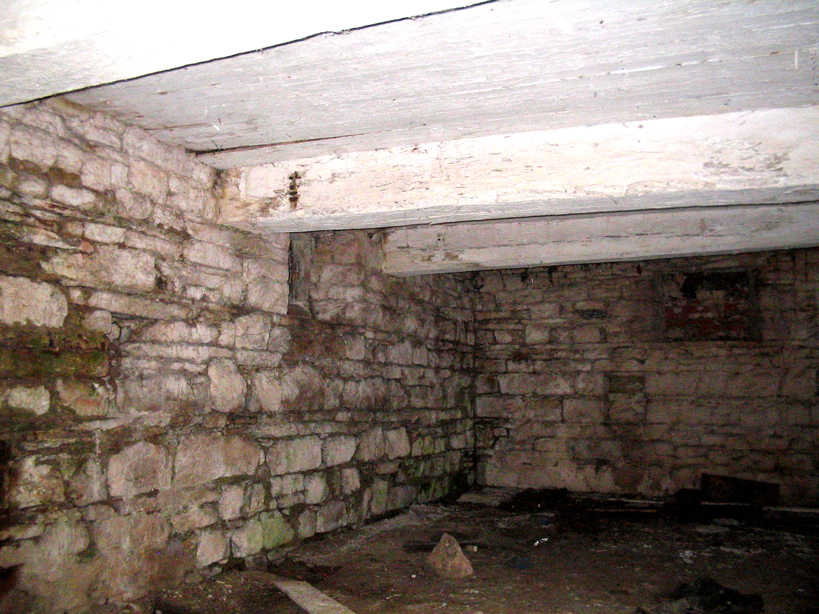 Tannerie Kalpers (Malmedy) : cave non voutée.